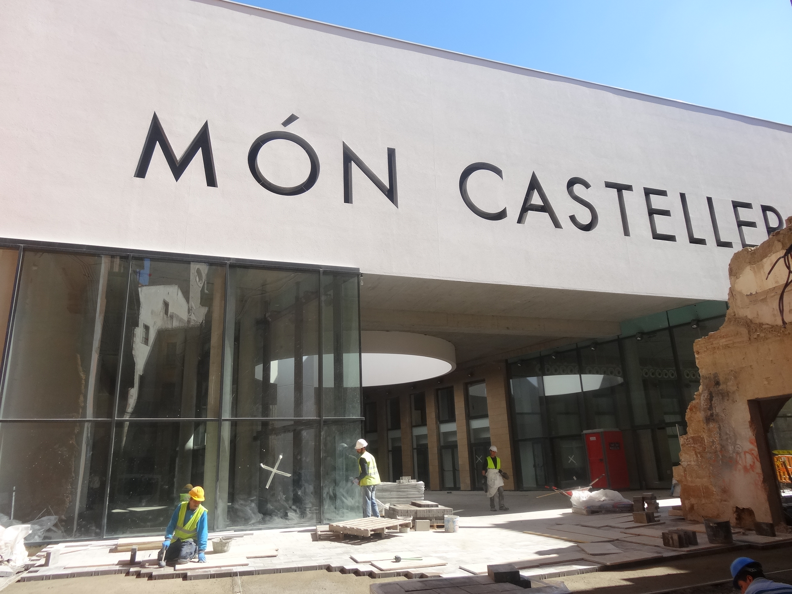 Març de 2017. Obres al Museu Casteller de Catalunya, Valls